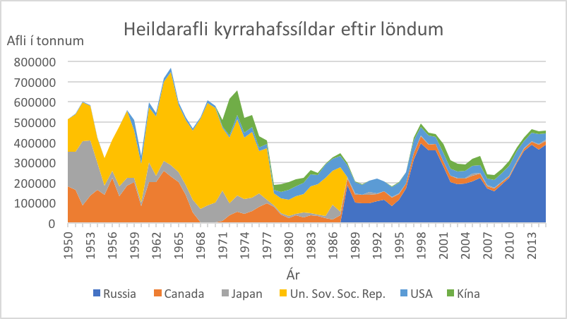 Veiðar á kyrrahafssíld frá upphafi mælingar